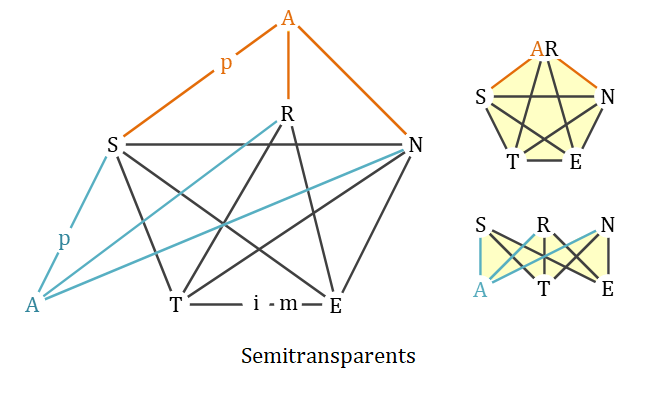 Exemple d'aodarmdroma que conté els subgrups K5 i K33